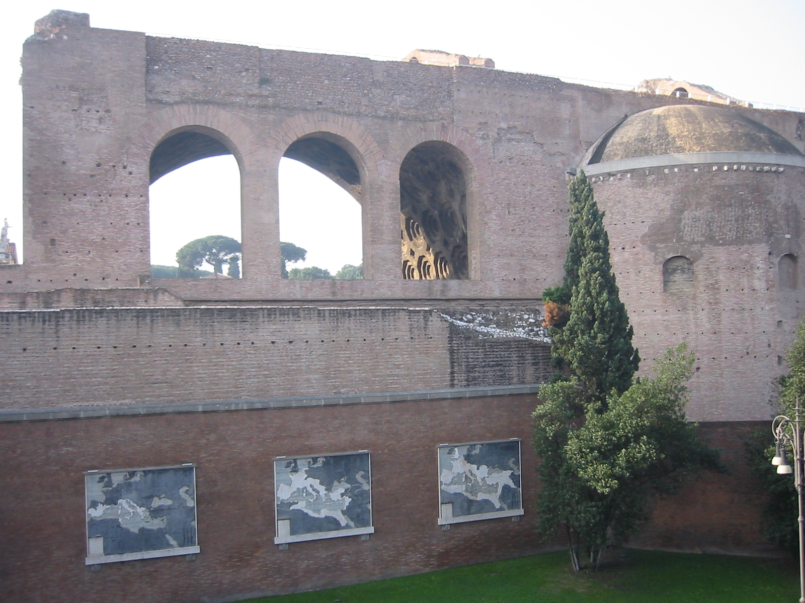 Roma